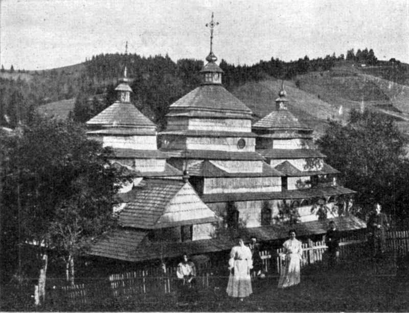 Xitar_Cerk_st_M